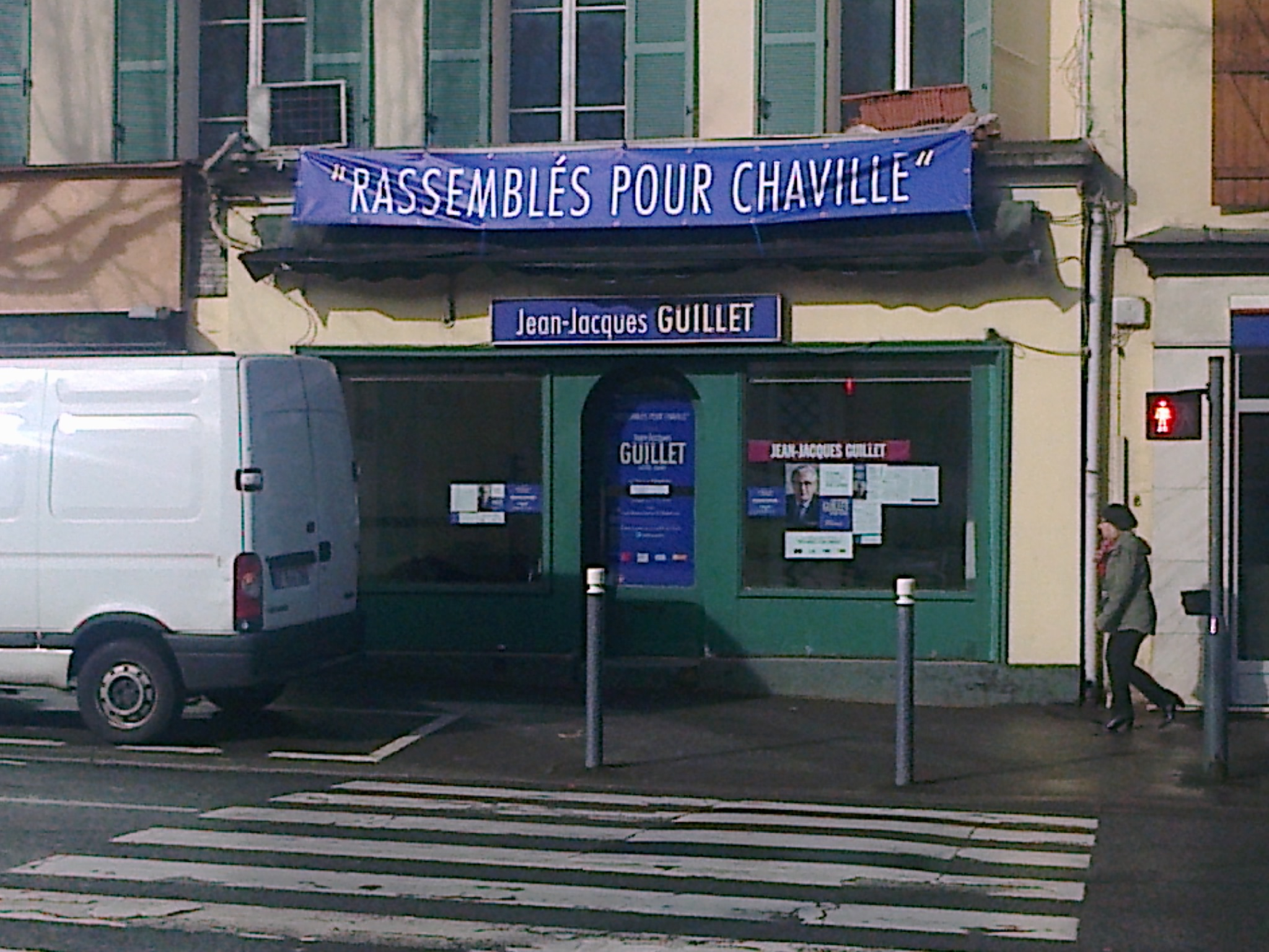 QG de campagne du candidat Jean-Jacques Guillet pour les élections municipales de 2014